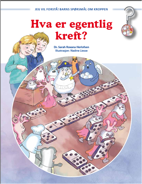 Cover av boken "Hva er egentlig kreft" Alle rettigheter tilhører Herosa forlaget